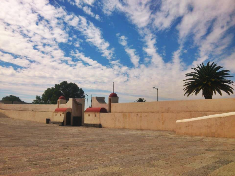 Antiguo Fuerte de Guadalupe